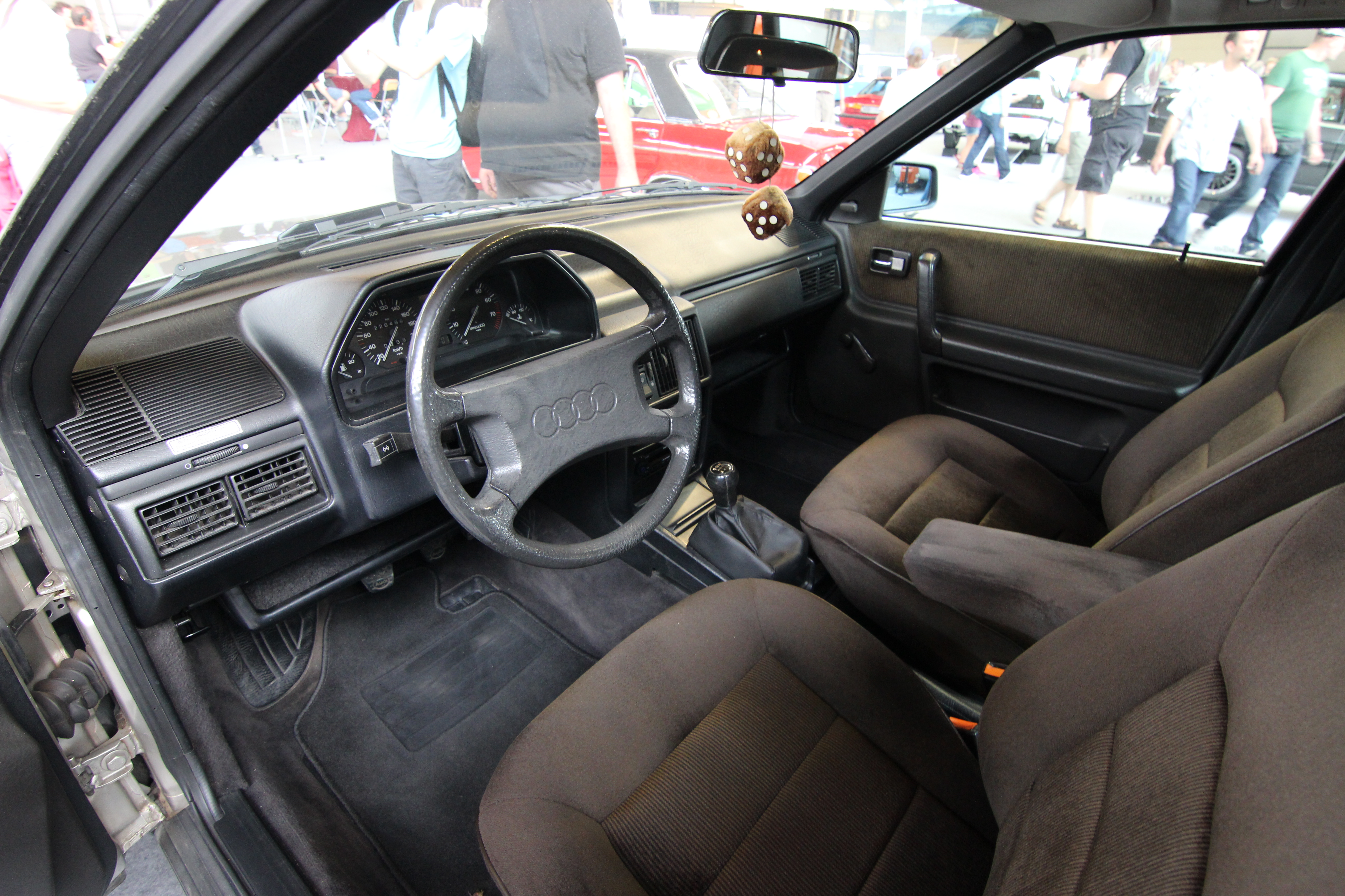 Audi 100 C3 Typ 44 - Version ohne Facelift